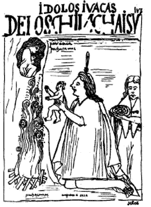 Ceremonia de Capac hucha. Grabado